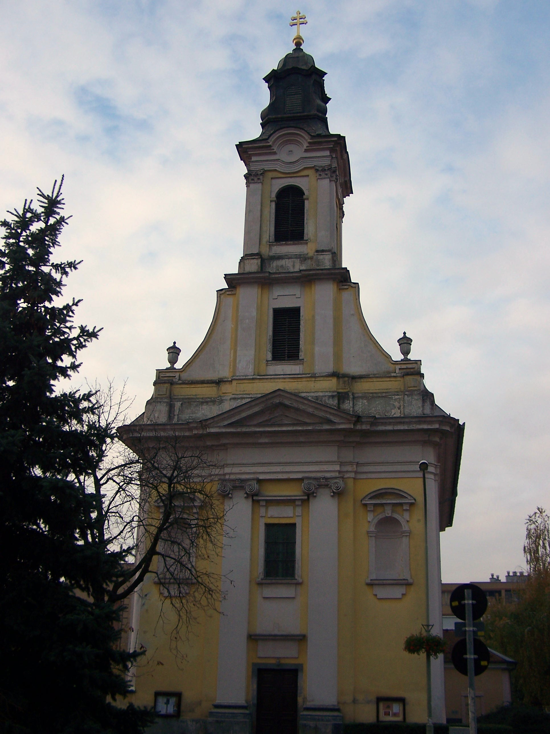 Nagyboldogasszony római katolikus templom (Monor, Kossuth Lajos utca 85., Mátyás Király utca 1.) This is a photo of a monument in Hungary, Identifier: 7131